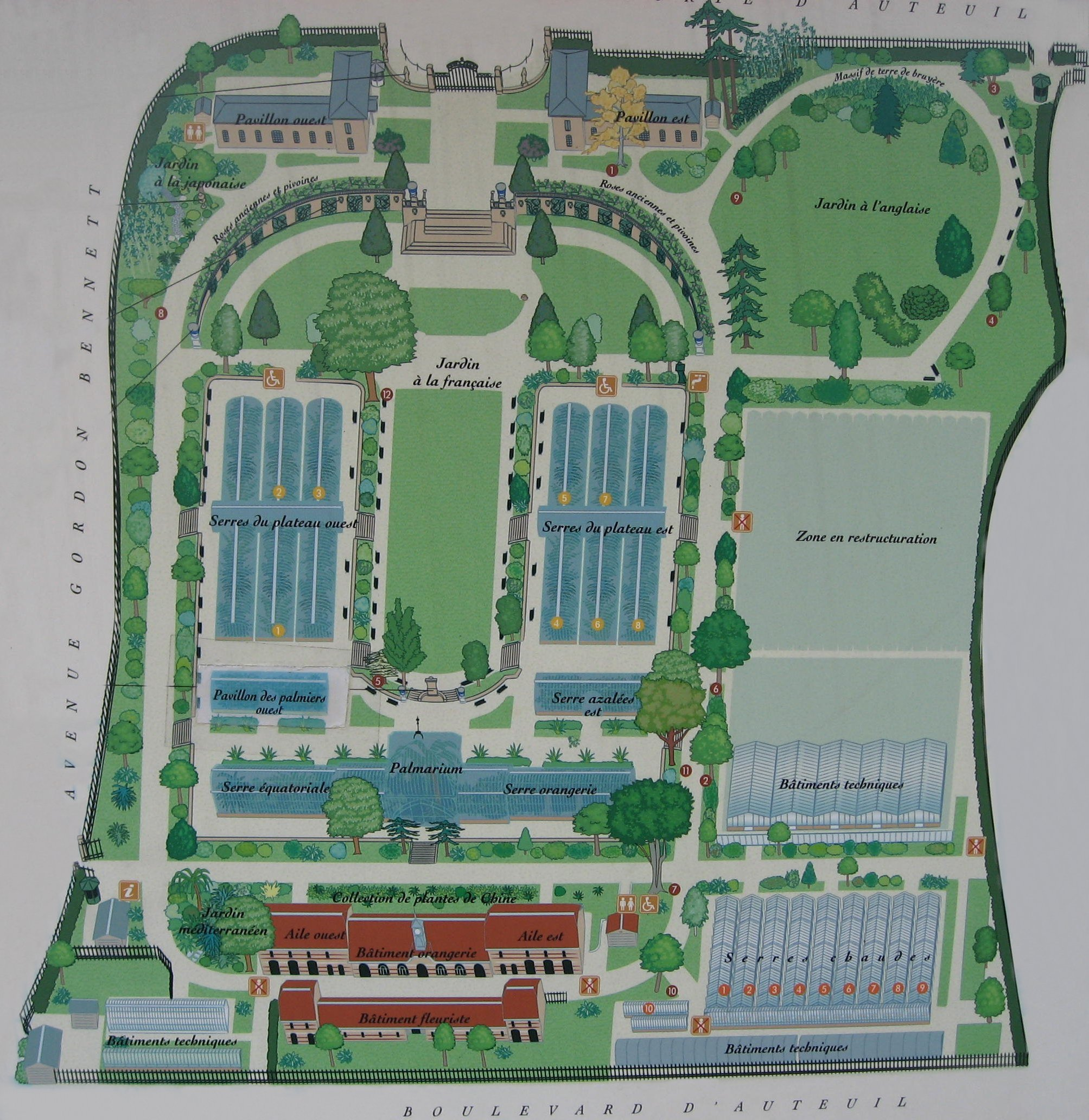 Map of Serres d'Auteuil. Version nettoyée de Image:Plan des Serres d'Auteuil 01 by Line1.JPG. Map: 48° 50' 49" N 2° 15' 8" E